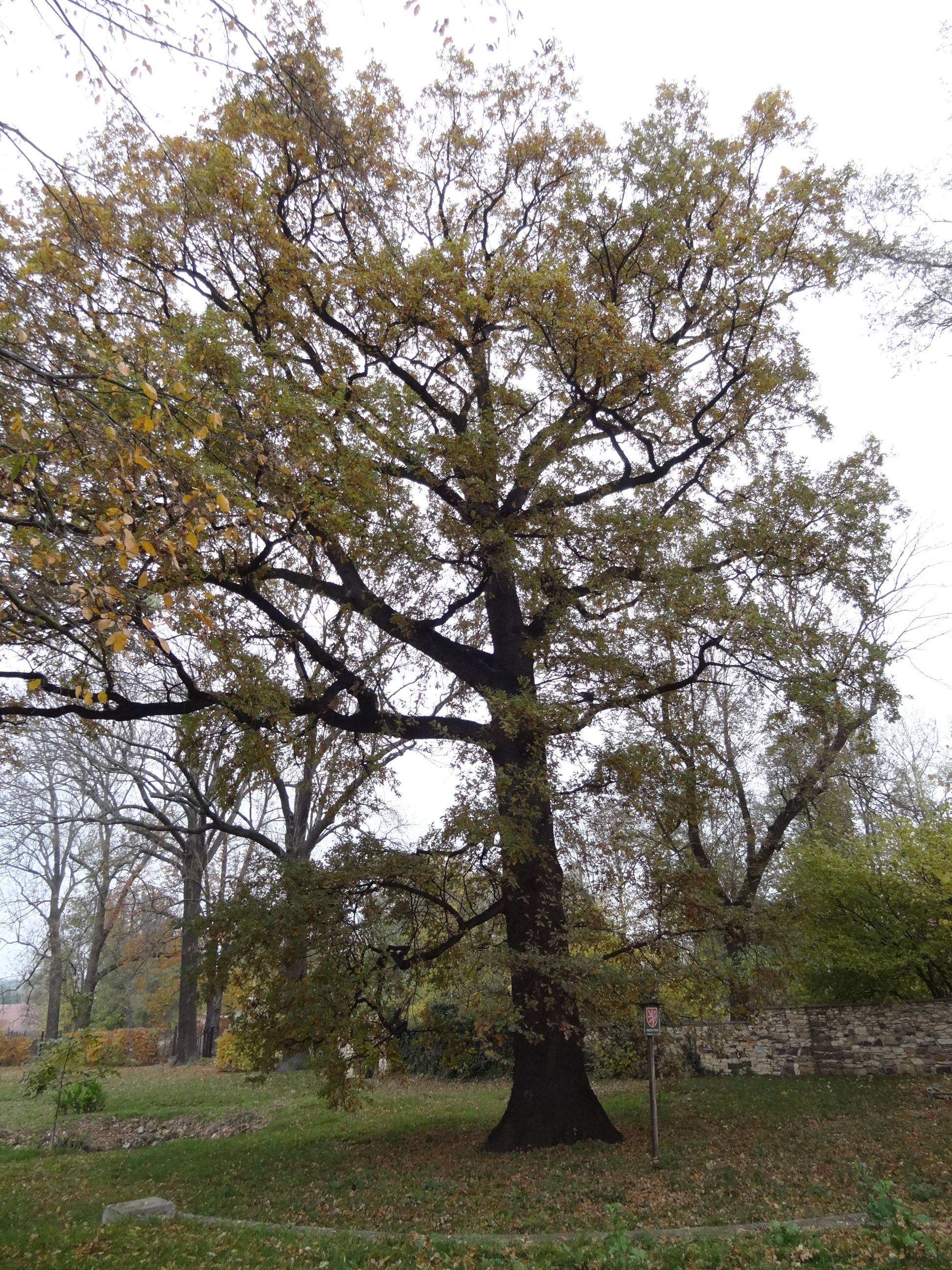 Dolní Chabry - památný dub letní v zahradě čp. 253